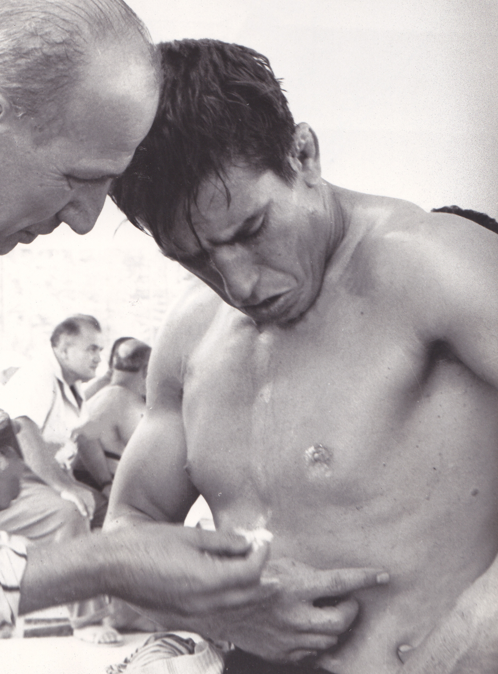 Hasan Güngör, 1960 Olympics